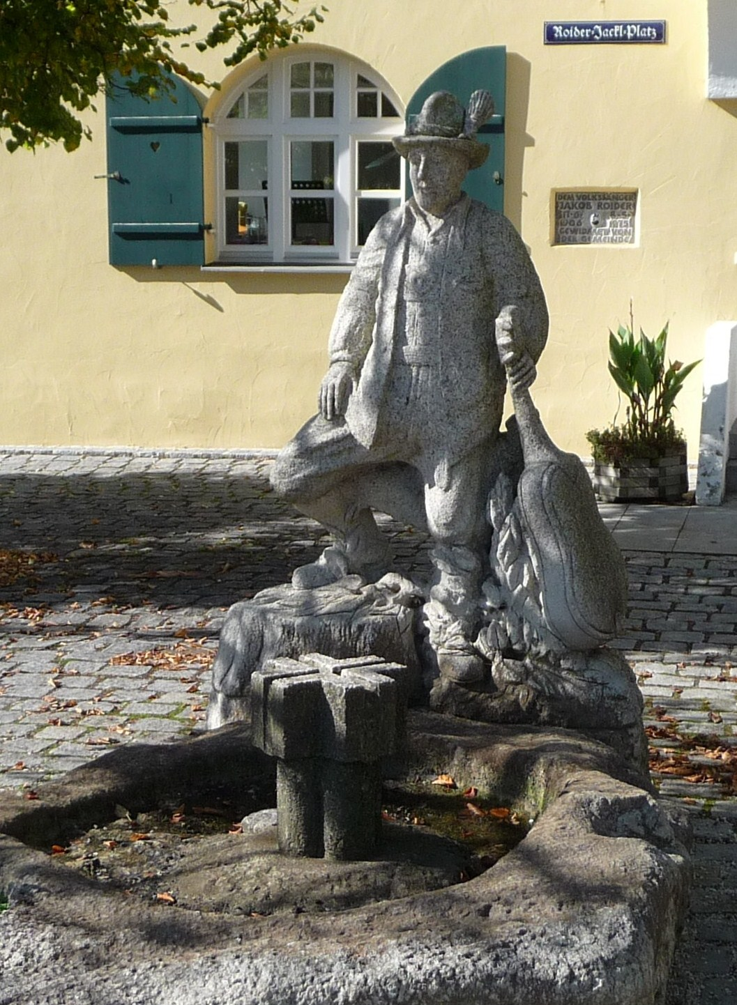 Der Roider-Jackl-Brunnen auf dem Roder-Jackl-Platz in Weihmichl (ursprünglich bei RegioWiki hochgeladen [1])